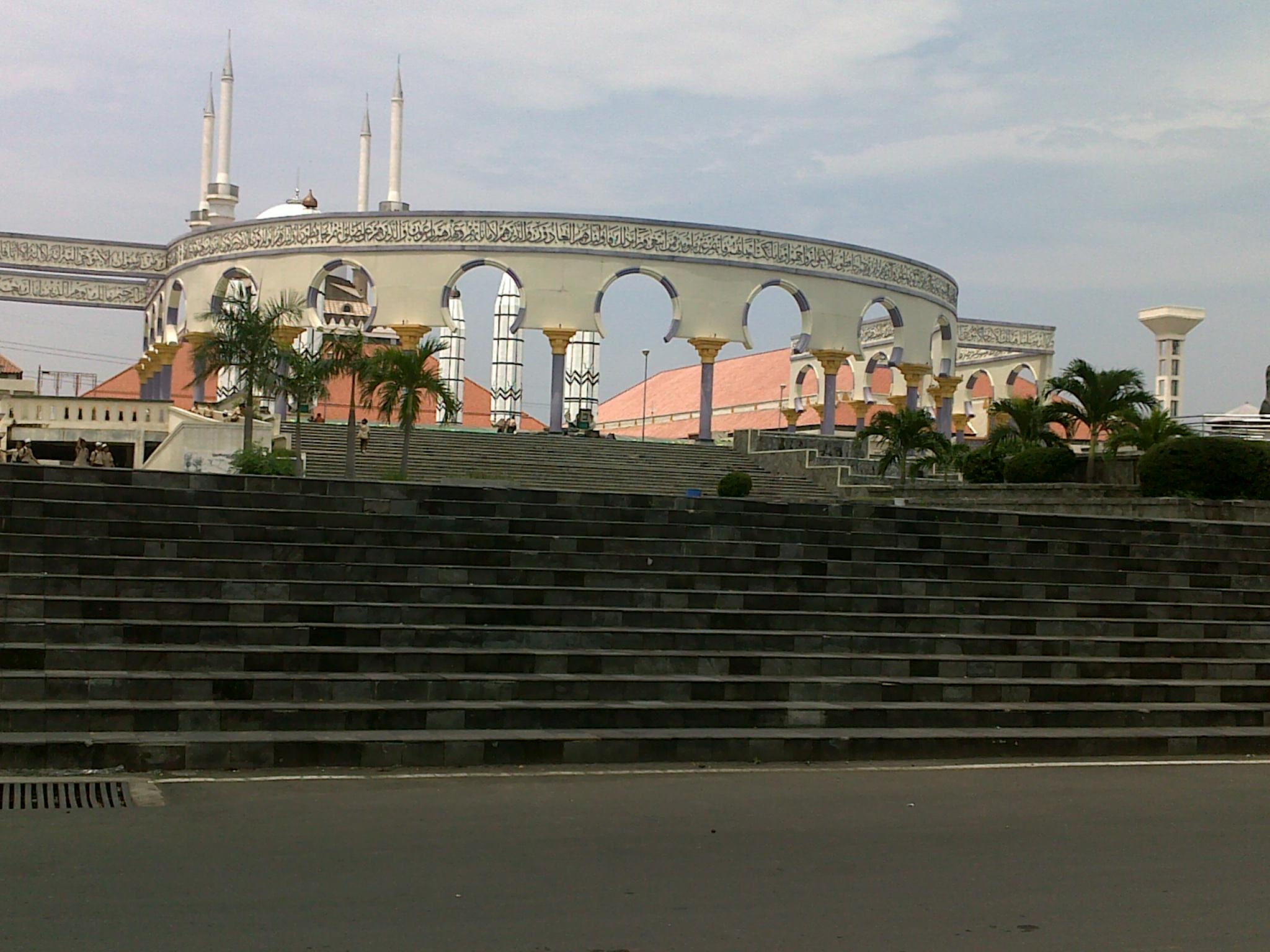 Masjid Agung Jawa Tegah kang mapan ing Gayamsari, Semarang, Kutha Semarang